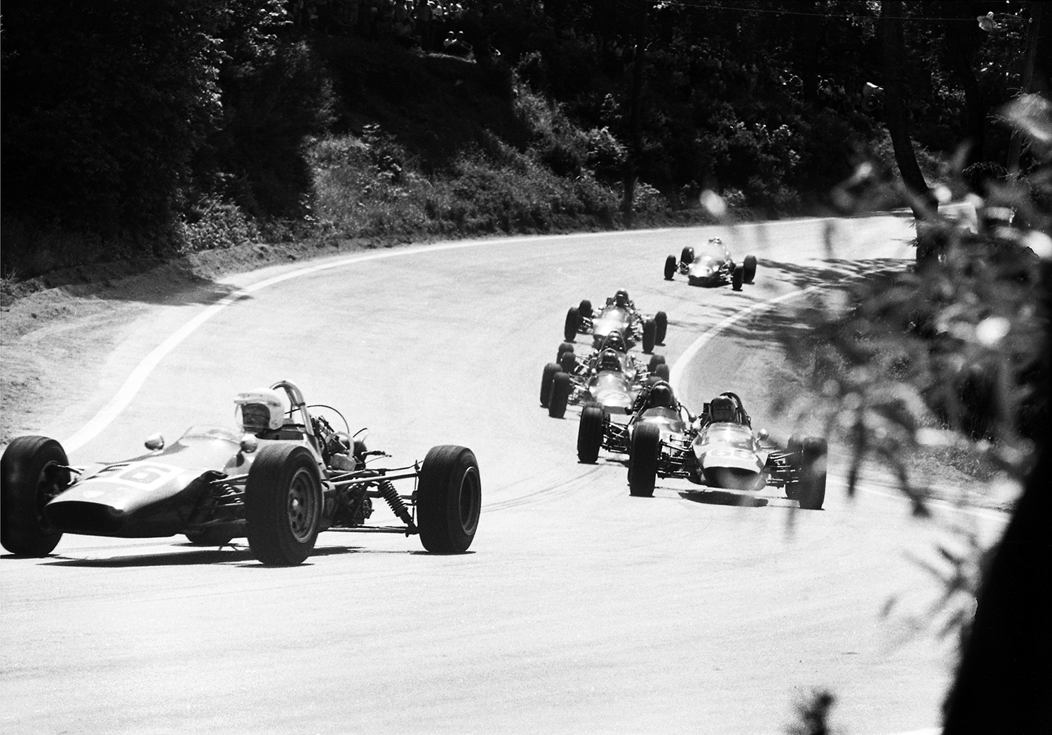 Pirita-Kose-Kloostrimetsa ringrada 74 (2)